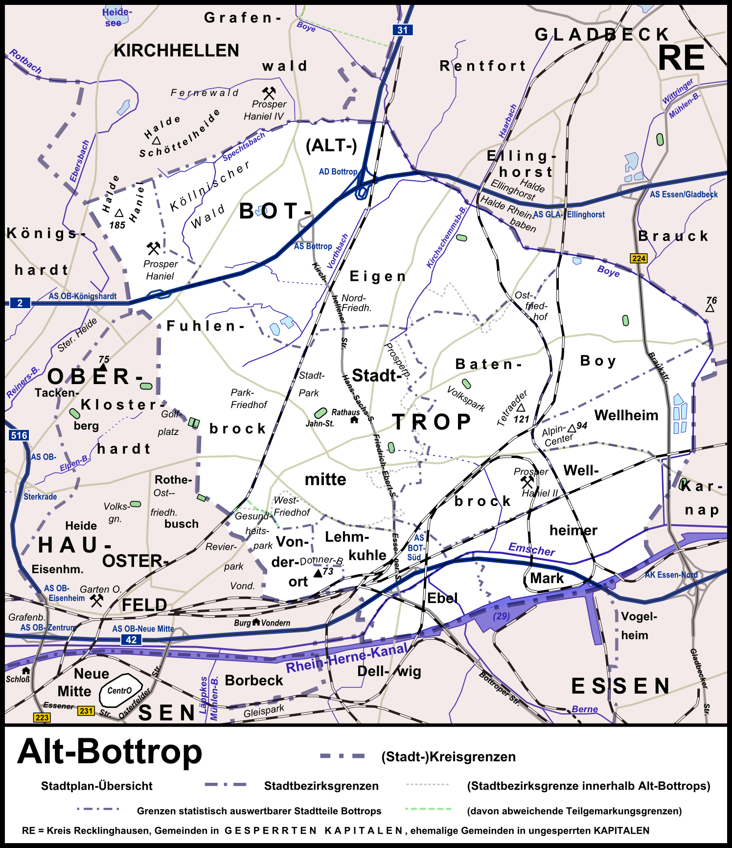 Stadtplanübersicht Alt-Bottrops